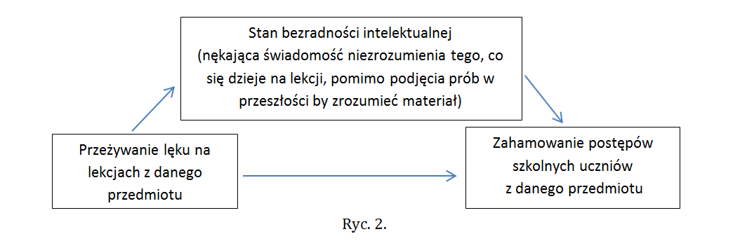 Model obrazujący wyniki badań Grzegorza Sędka